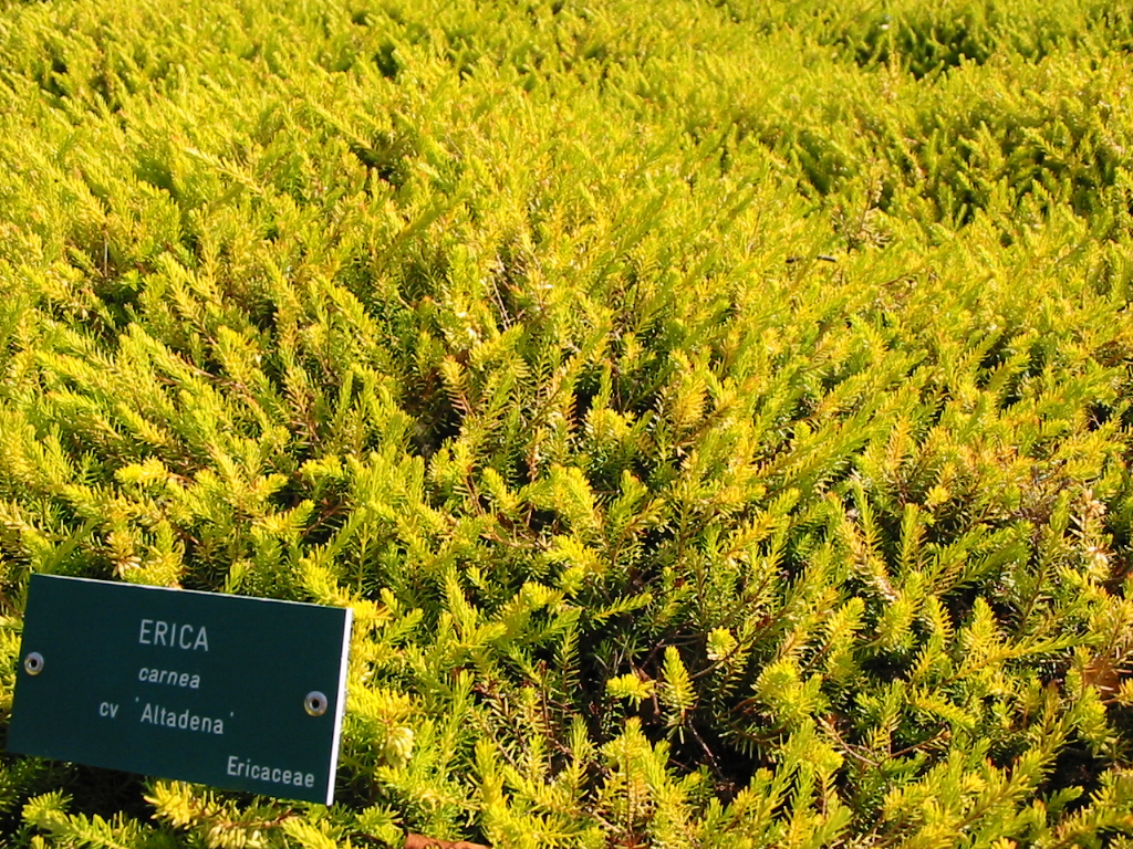 *La bruyère au feuillage jaune est Erica carnea ’Altadena’. La floraison rose a lieu en hiver. Jardins de Callunes (botanical garden) - Ban-de-Sapt (88210), France.